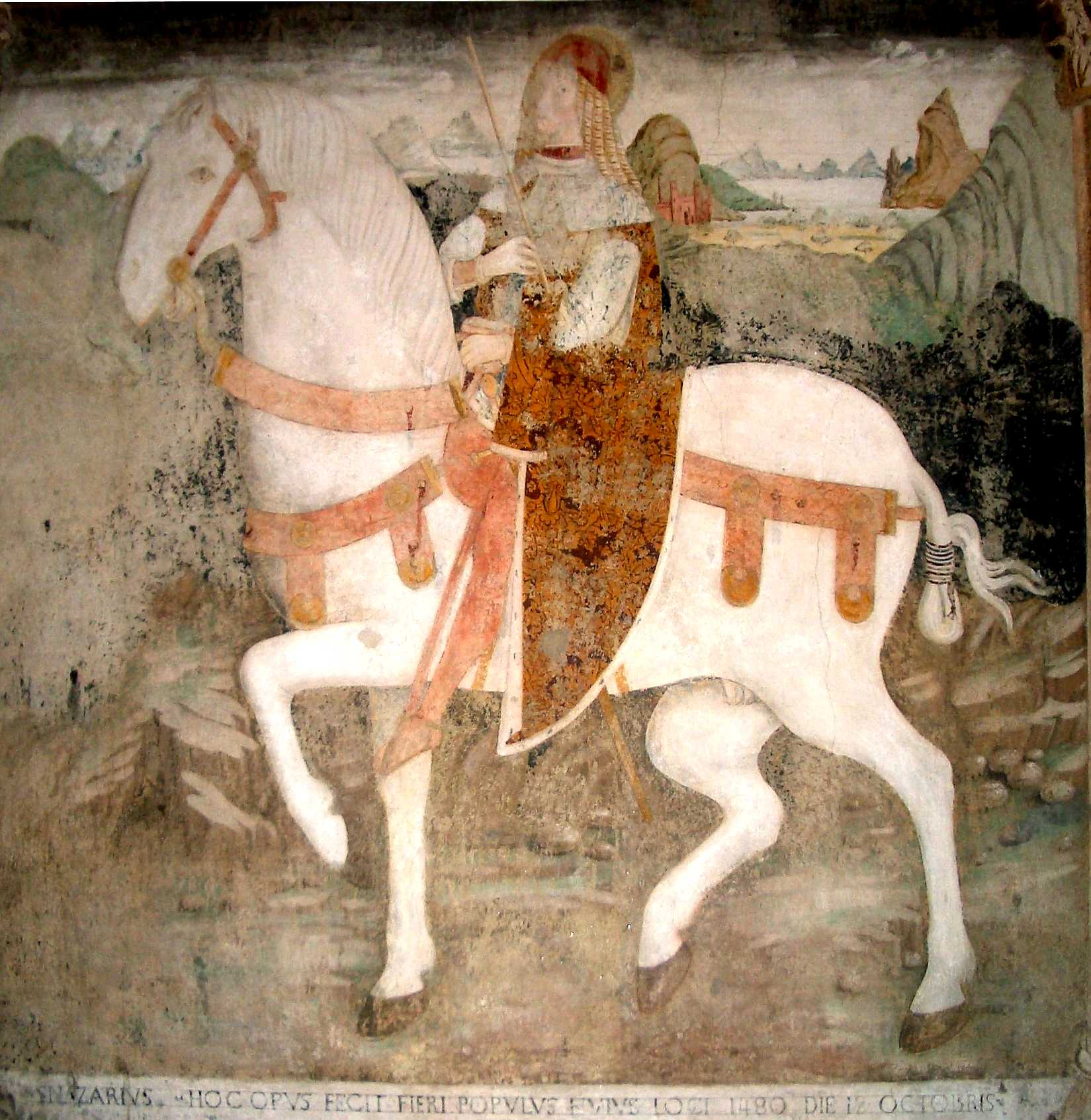 Giovanni Antonio Merli (?), Saint Nazario on a horse, fresco, 1480. St. Nazzaro and Celso Abbey, San Nazzaro Sesia, Novara, Italy.